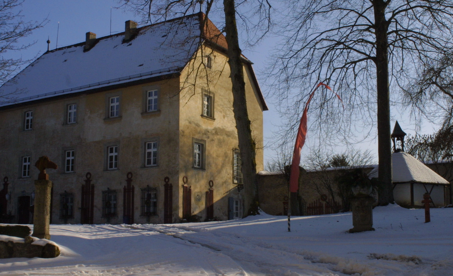 Schloss Oberaufseß